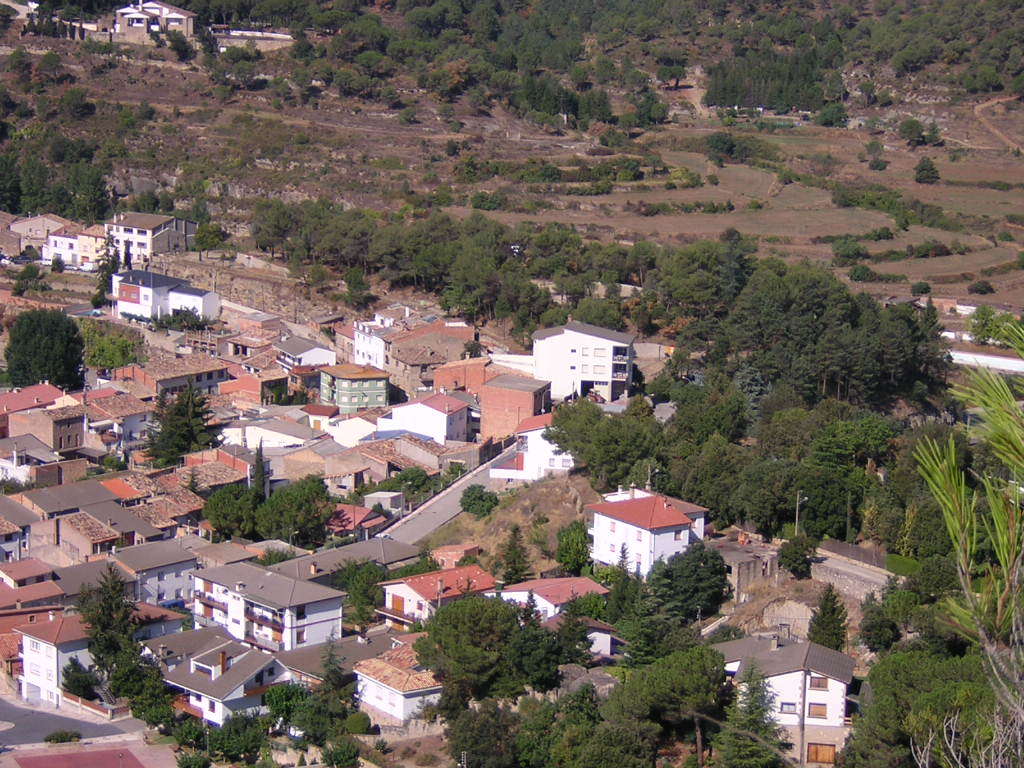 El Parc del Serrat (Monistrol de Calders, Moianès)